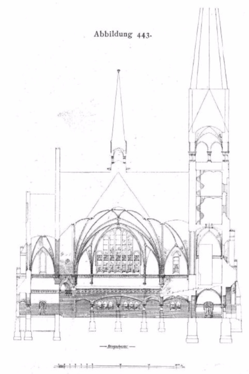 Trinitatiskirche, Entwurf J. Vollmer u. H. Jassoy 1896, Längsschnitt